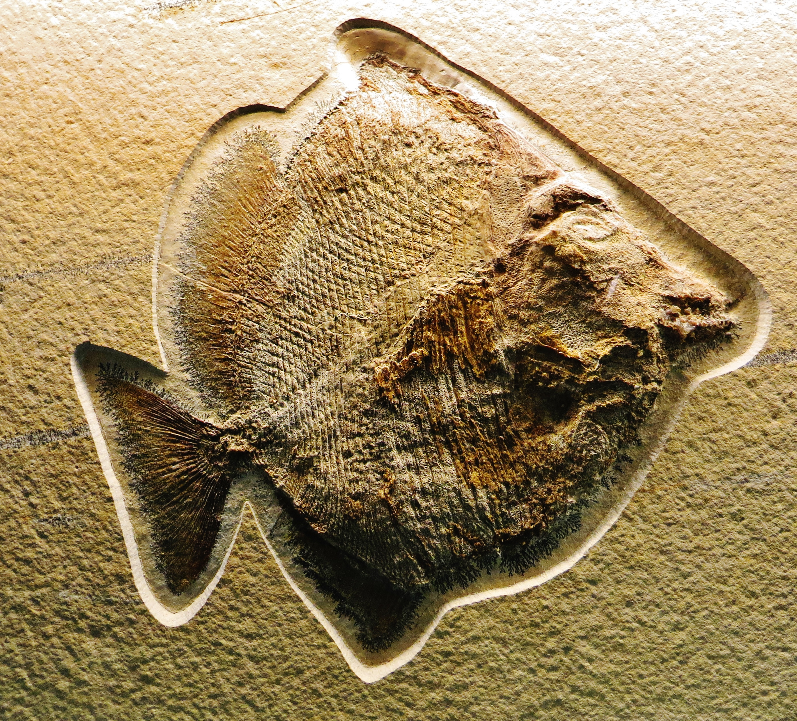 Took the picture at Burgmeister Muller Museum, Solnhofen